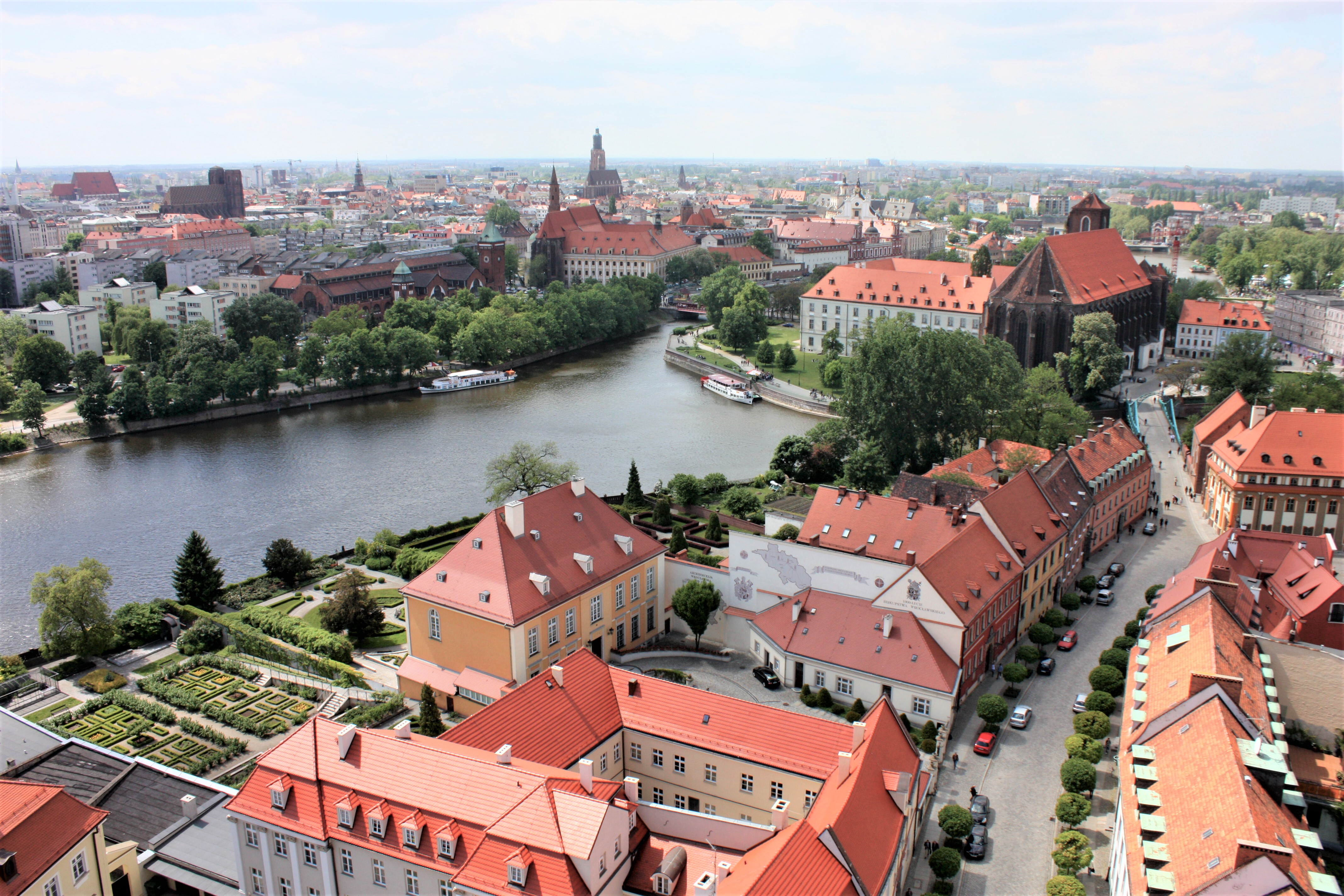 Wrocław, zespół urbanistyczny Ostrowia Tumskiego i wysp: Piaskowej, Bielarskiej, Słodowej